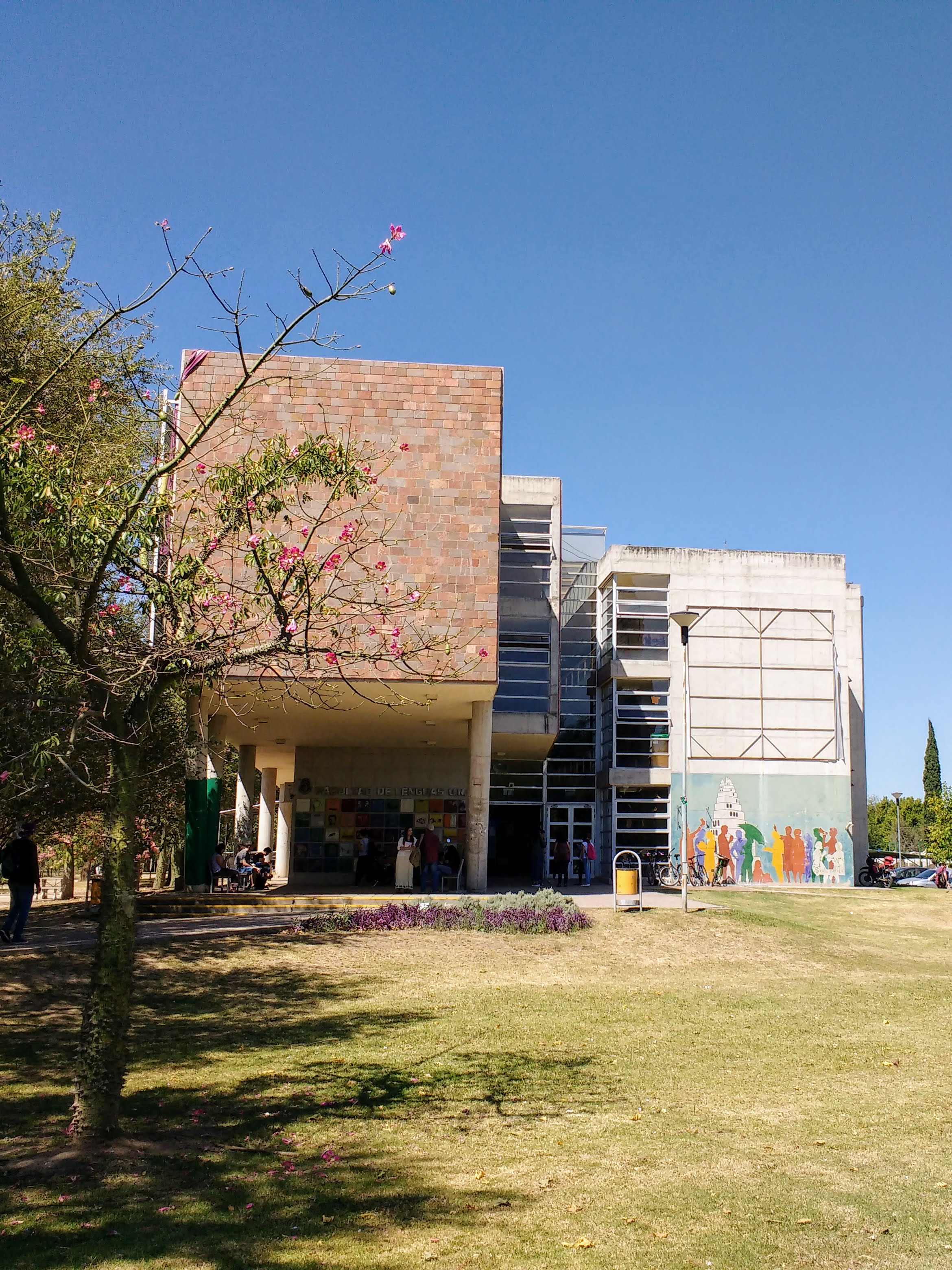 Facultad de Lenguas, Universidad Nacional de Córdoba, Argentina.